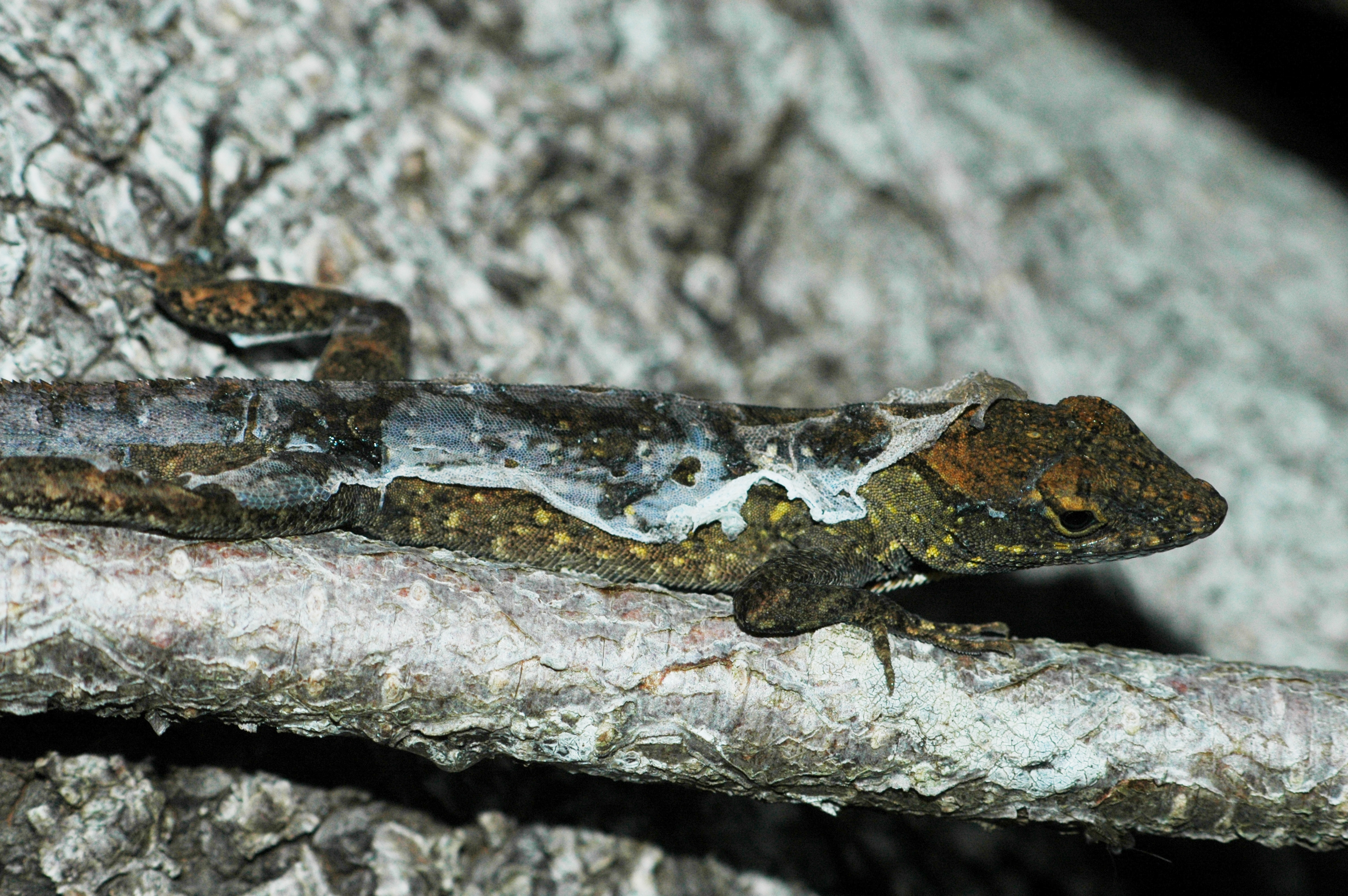 Mue d'un Anolis sagrei en Floride / Molting of Anolis sagrei in Florida.